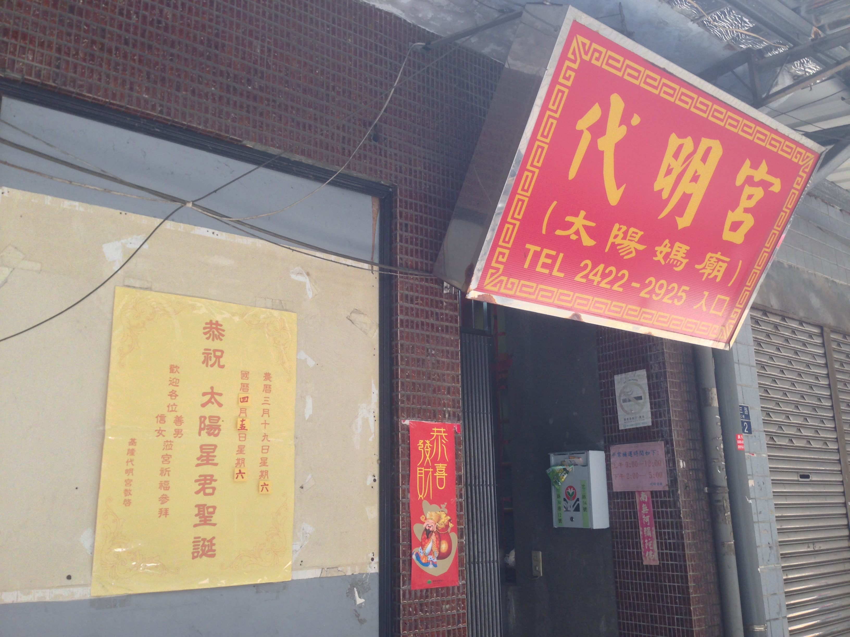 代明宮太陽星君誕辰告示